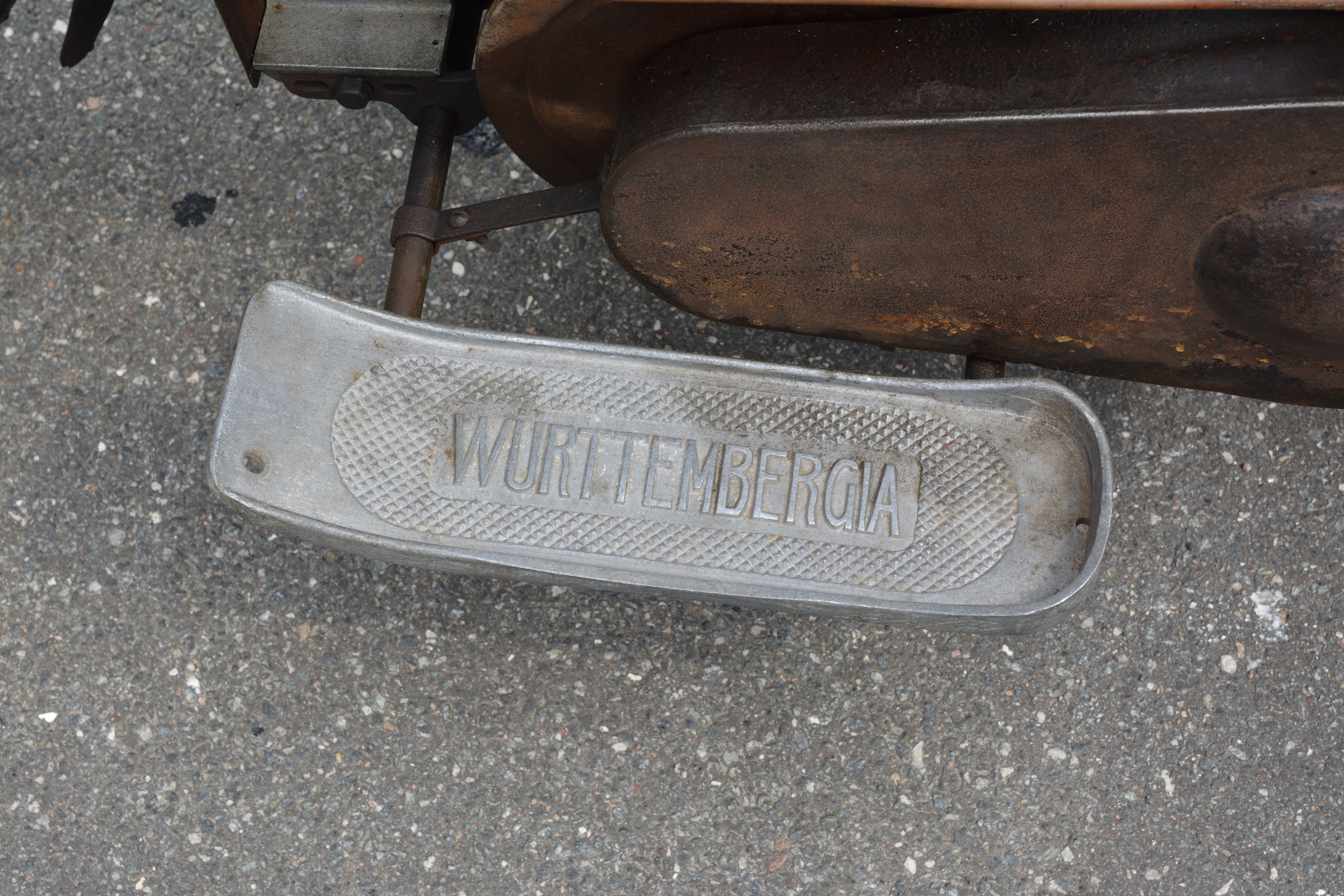 Impressionen der "Zehnten Internationalen VFV ADAC Zwei-Tage-Motorrad-Veteranen-Fahrt-Norddeutschland" und der "33ten Int-Windmill-Rally" 2018 in Wilster. Teilnehmer- und Modelliste Leider standen die Maschinen am Breakpoint entweder extrem dicht oder die Teilnehmer fuhren schnell wieder ab. Alle Maschinen mussten vor 1945 gebaut sein.